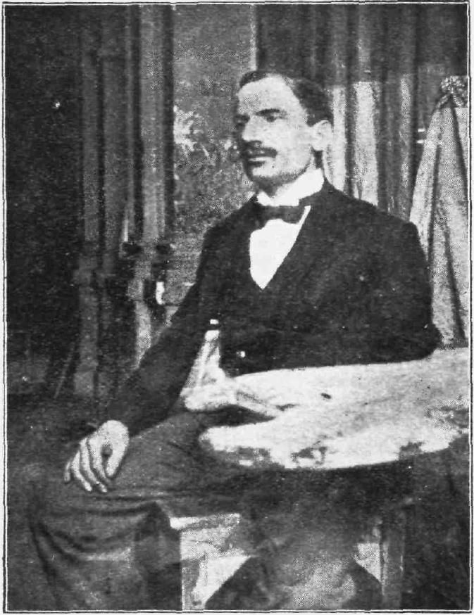 Griechischer Maler, 19. Jahrhundert